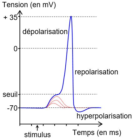 PA et seuil